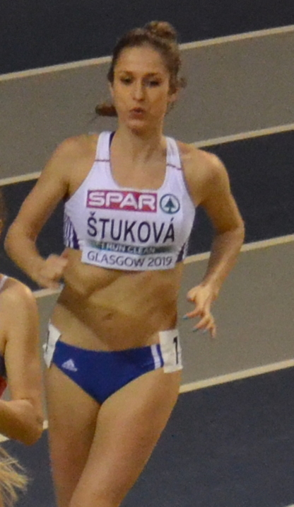 Womens 800m